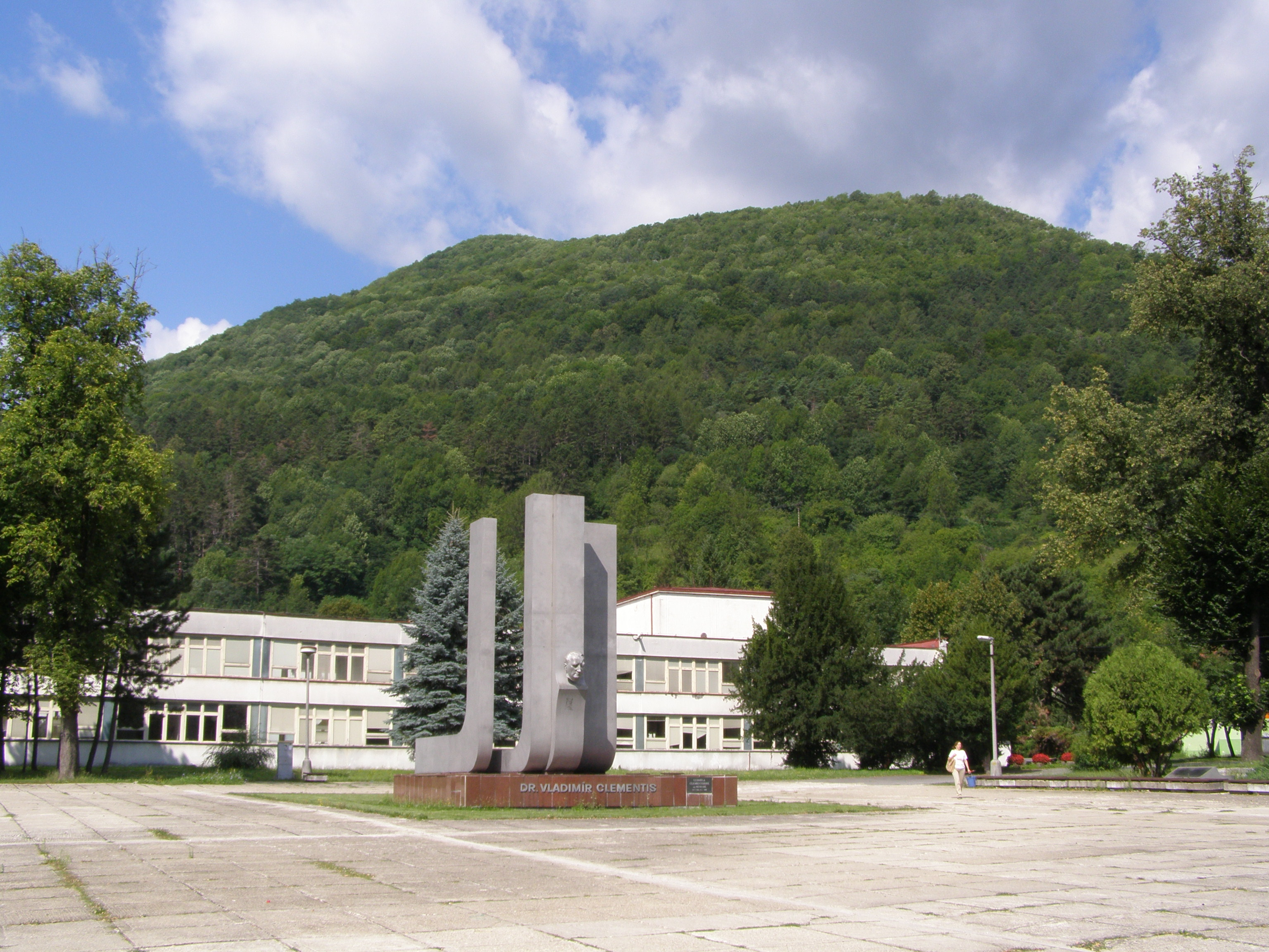 Tisovec (okres Rimavská Sobota), Náměstí Dr. V. Clementise